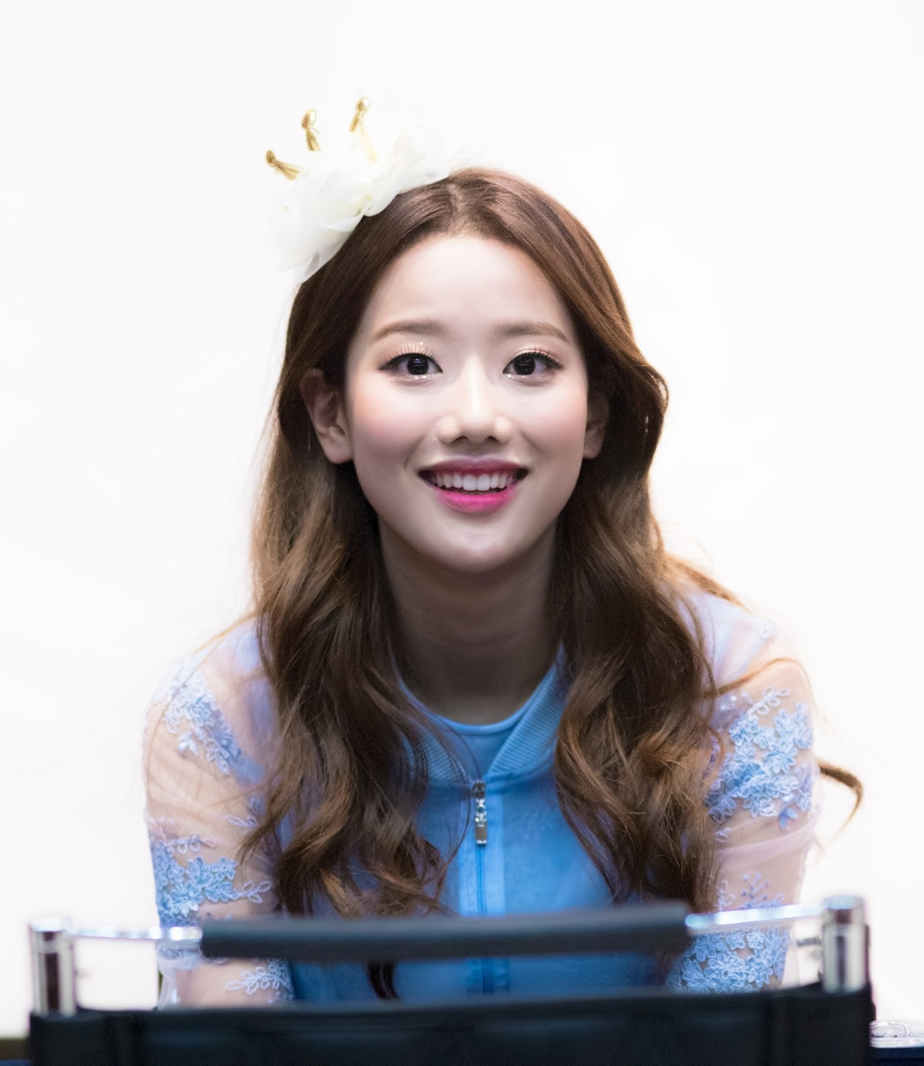 170115 목동 APRIL 팬싸인회 나은 8Pic